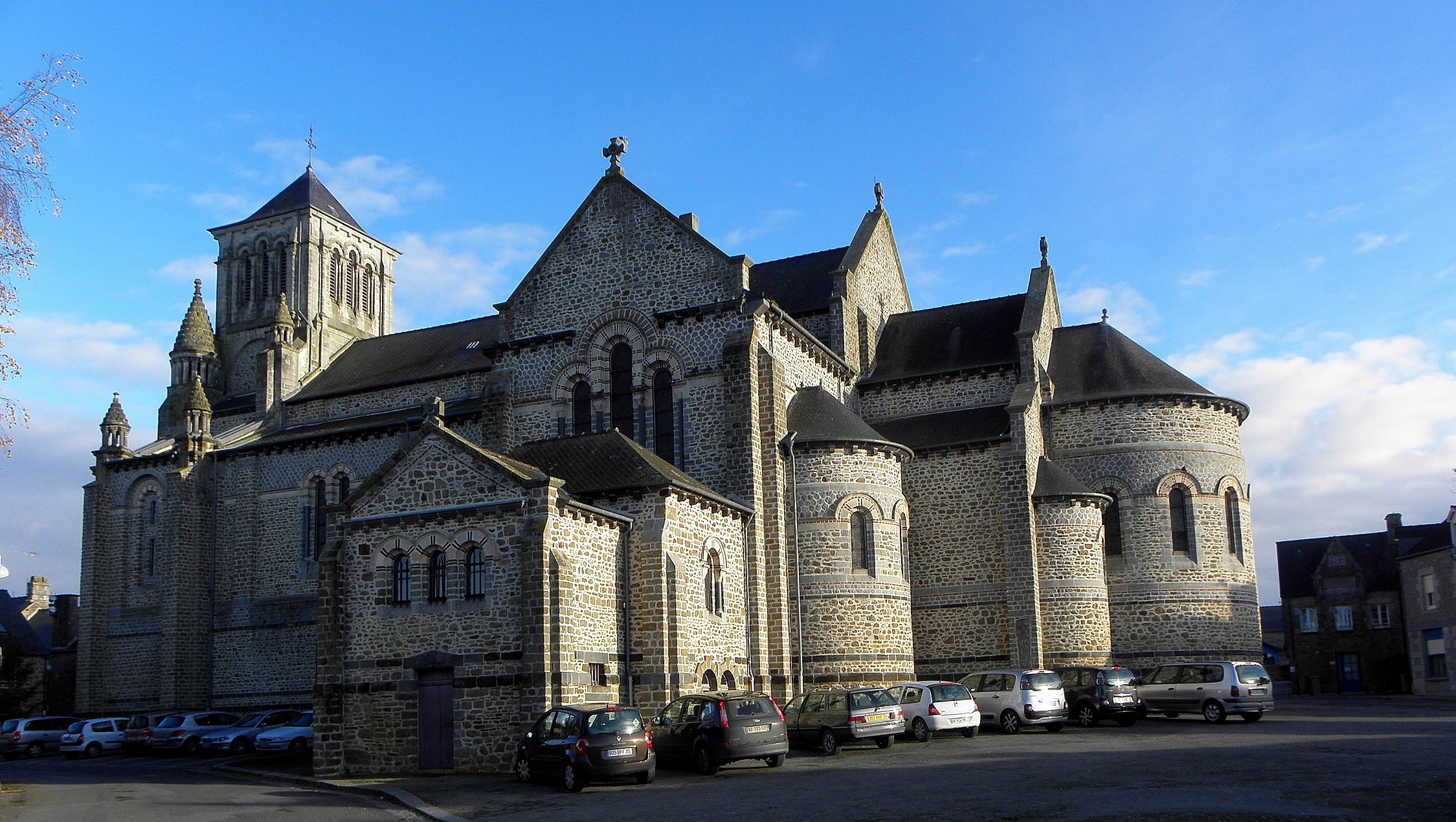 Église Saint-Étienne de Saint-Étienne-en-Coglès (35). Vue du sud-ouest.